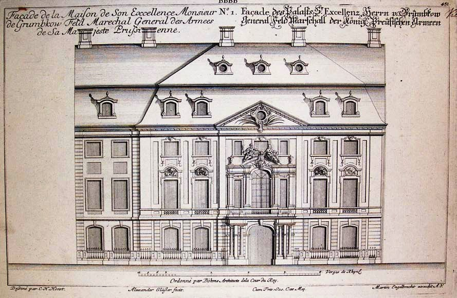 Fassade des Palais Grumbkow in der Königstraße 60 (heute Rathausstraße) in Berlin. Kupferstich von Christian Heinrich Horst. Das Gebäude wurde ab 1816 von der Post genutzt. Es existiert nicht mehr.